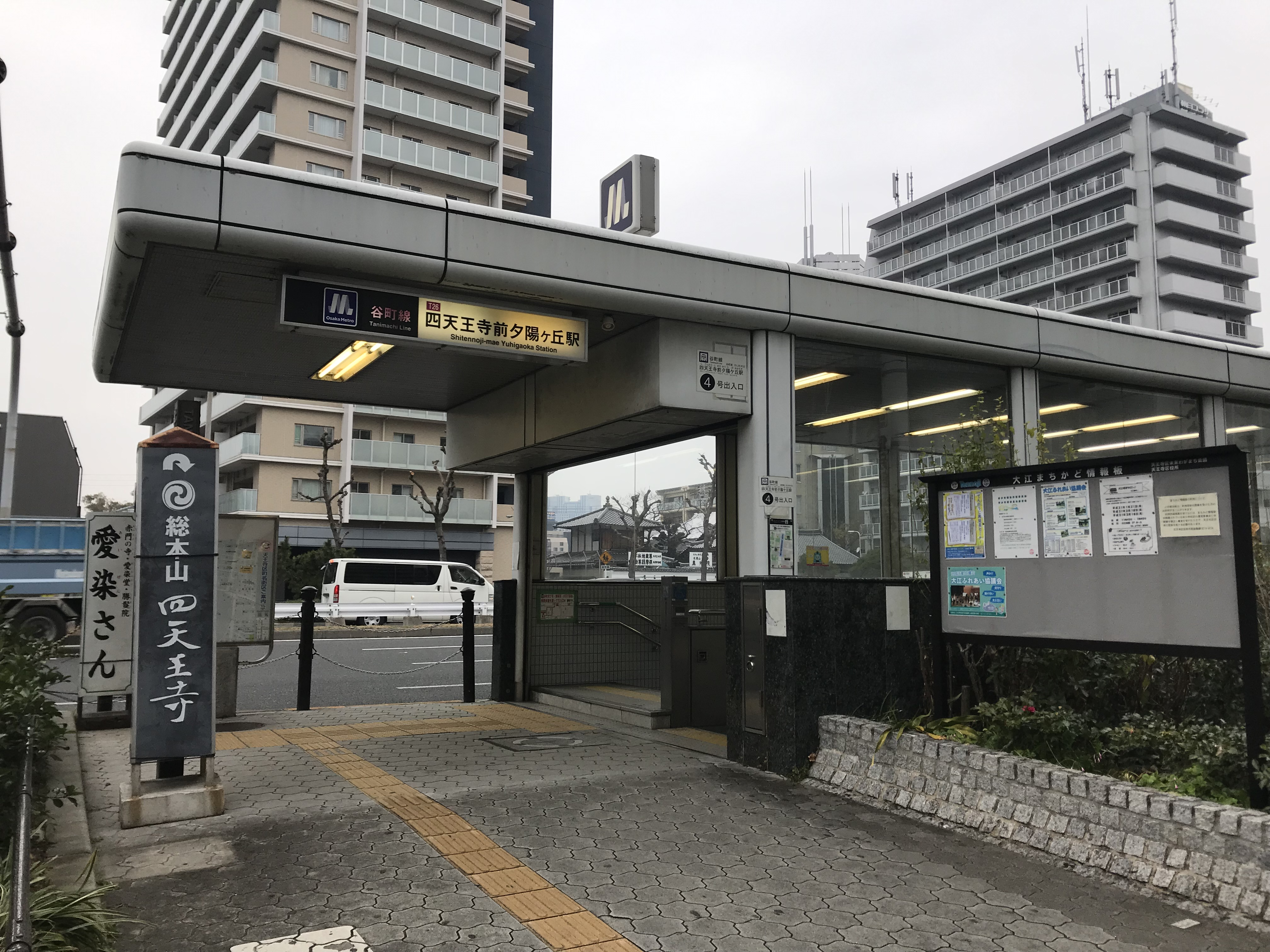 四天王寺前夕陽ヶ丘駅の4番出入り口